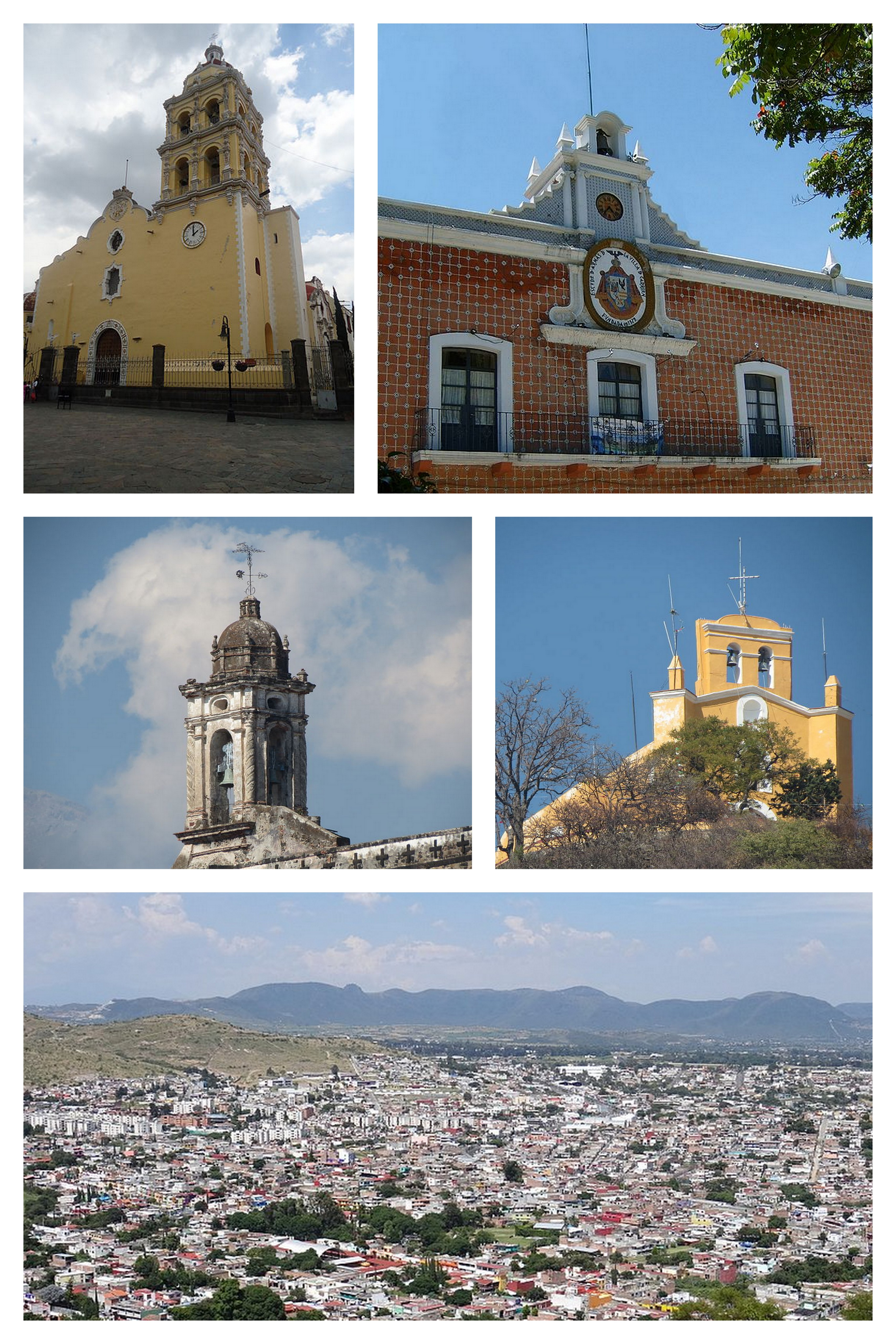 Montaje creado a partir de cinco imágenes en Wikimedia Commons: File:Ayuntamiento Atlixco.jpg File:View over Atlixco from Hilltop Church - Atlixco - Puebla - Mexico - 03 (20260877119).jpg File:Capilla de San Miguel, Atlixco, Puebla 02.JPG File:Convento de San Francisco, Atlixco, Puebla 01.JPG File:Atlixco013.JPG